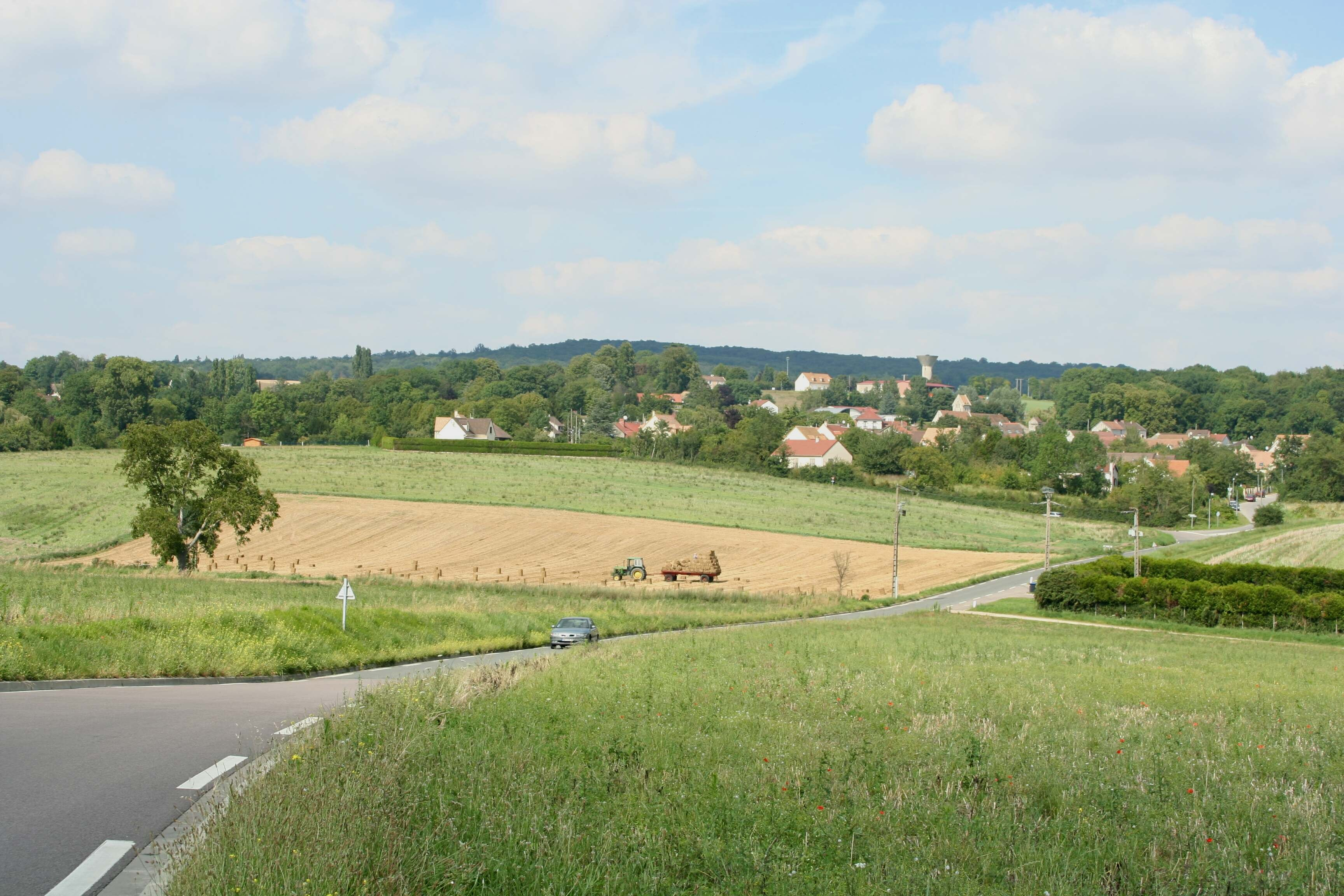 Vue générale de Guitrancourt, Yvelines (France)